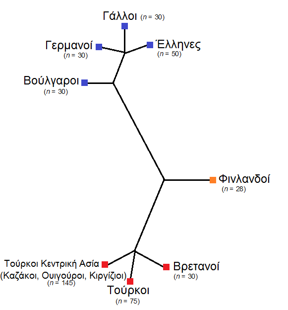 Φυλογενετικό δένδρο πληθυσμών της Ευρώπης